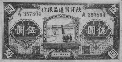 中文（中国大陆）: 陕甘宁边区政府发行的10元边币（原版为蓝色，1941年发行）